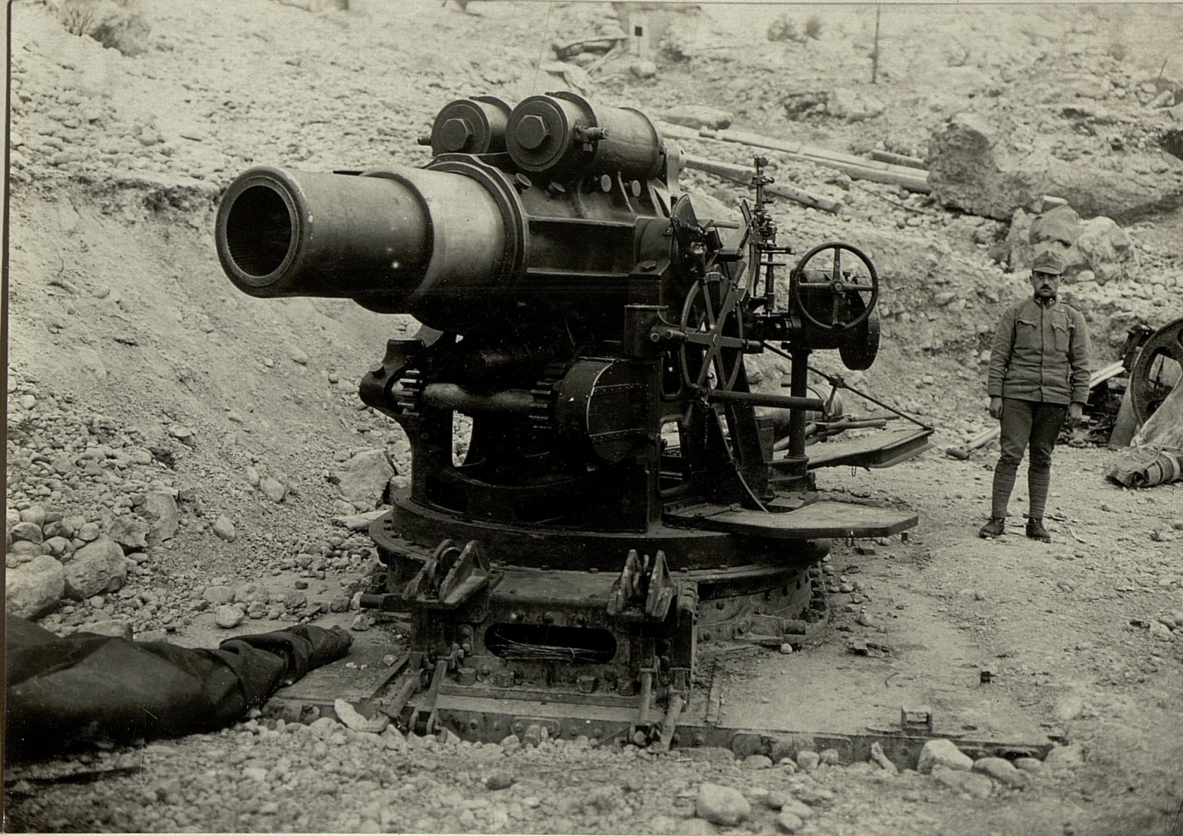 30.5 cm Mörser an der Straße nach Kerschowetz.